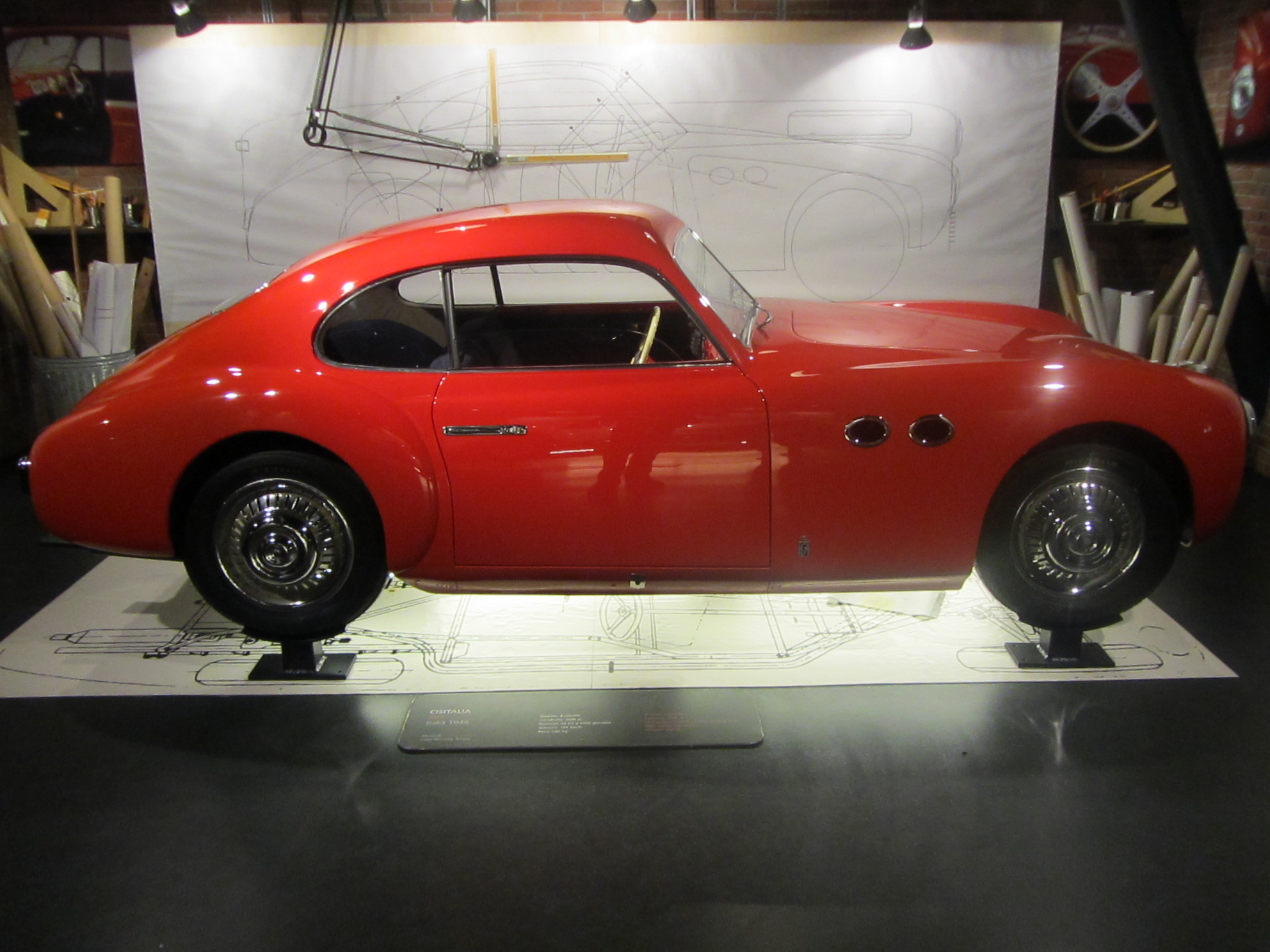 Museo Nazionale dell'Automobile di Torino CISITALIA 202 Italia: 1948 Motore 4 cilindri 1090 cc 50CV a 5500 giri/min Velocità max 155 km/h, 880 kg di peso